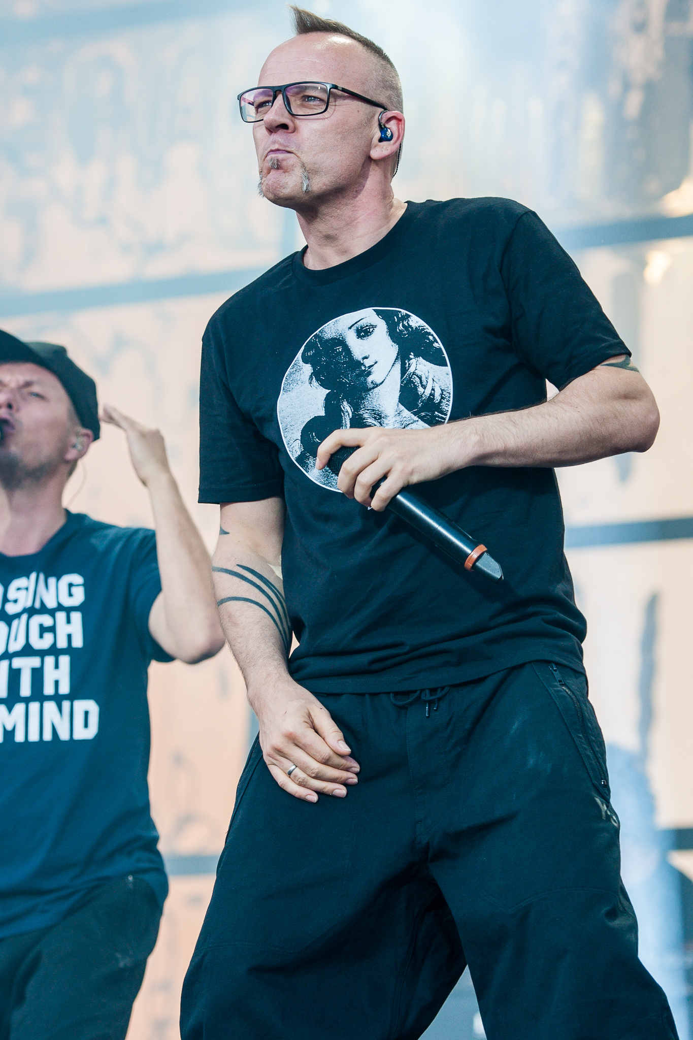 ARGO-Konzerte,Centerstage,Die fantastischen Vier,Fanta4,Konzert,Livekonzert,Livemusik,Michael Beck,Michi Beck,Musik,RiP,Rock im Park 2014,Thomas D,Thomas Dürr